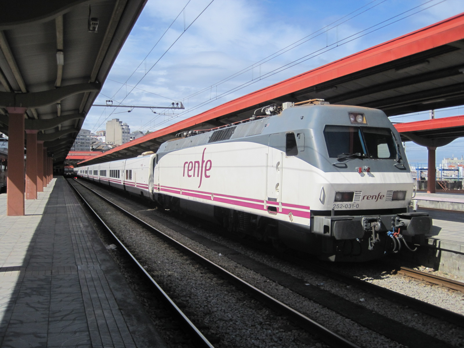 Trenhotel Vigo-Barcelona